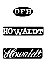 Meistermarken des Goldschmieds David Ferdinand Howaldt (1772-1850)